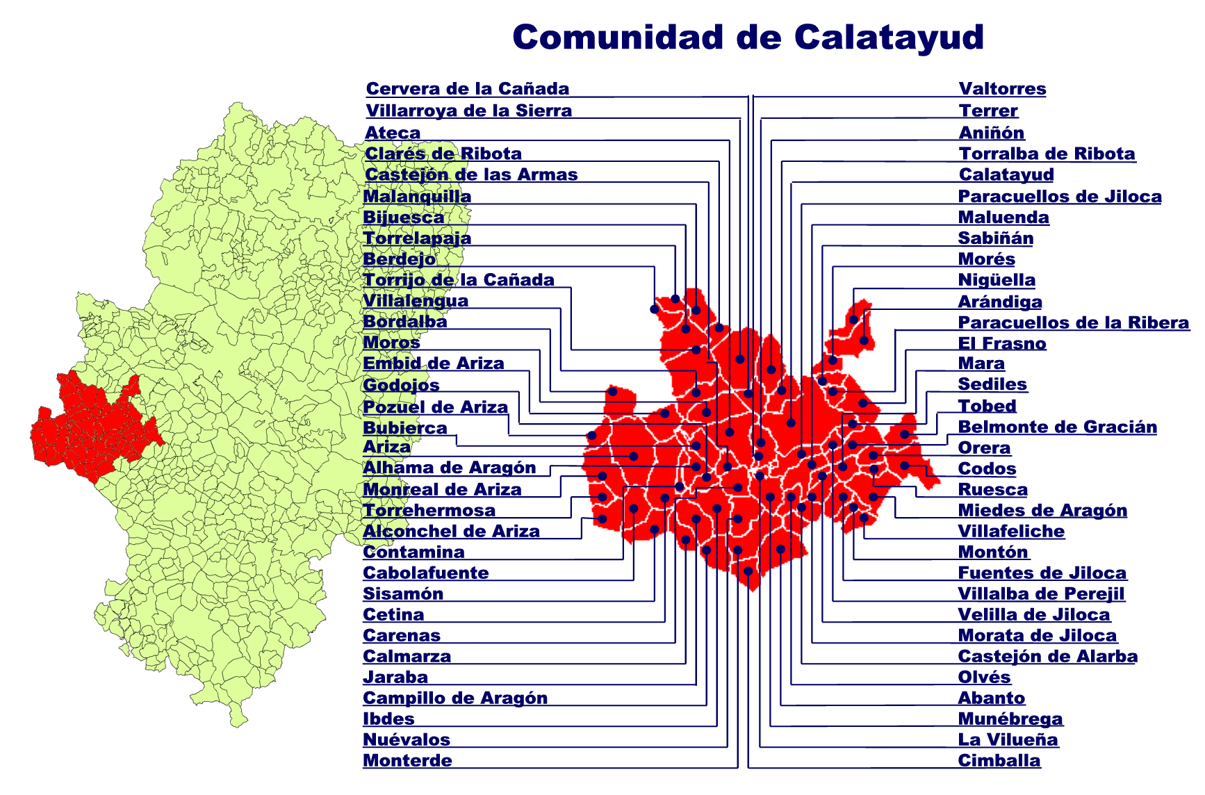 Comunidad de Calatayud Creado el 30.10.2005 por Ecelan en base a Image:Aragon municipalities.png